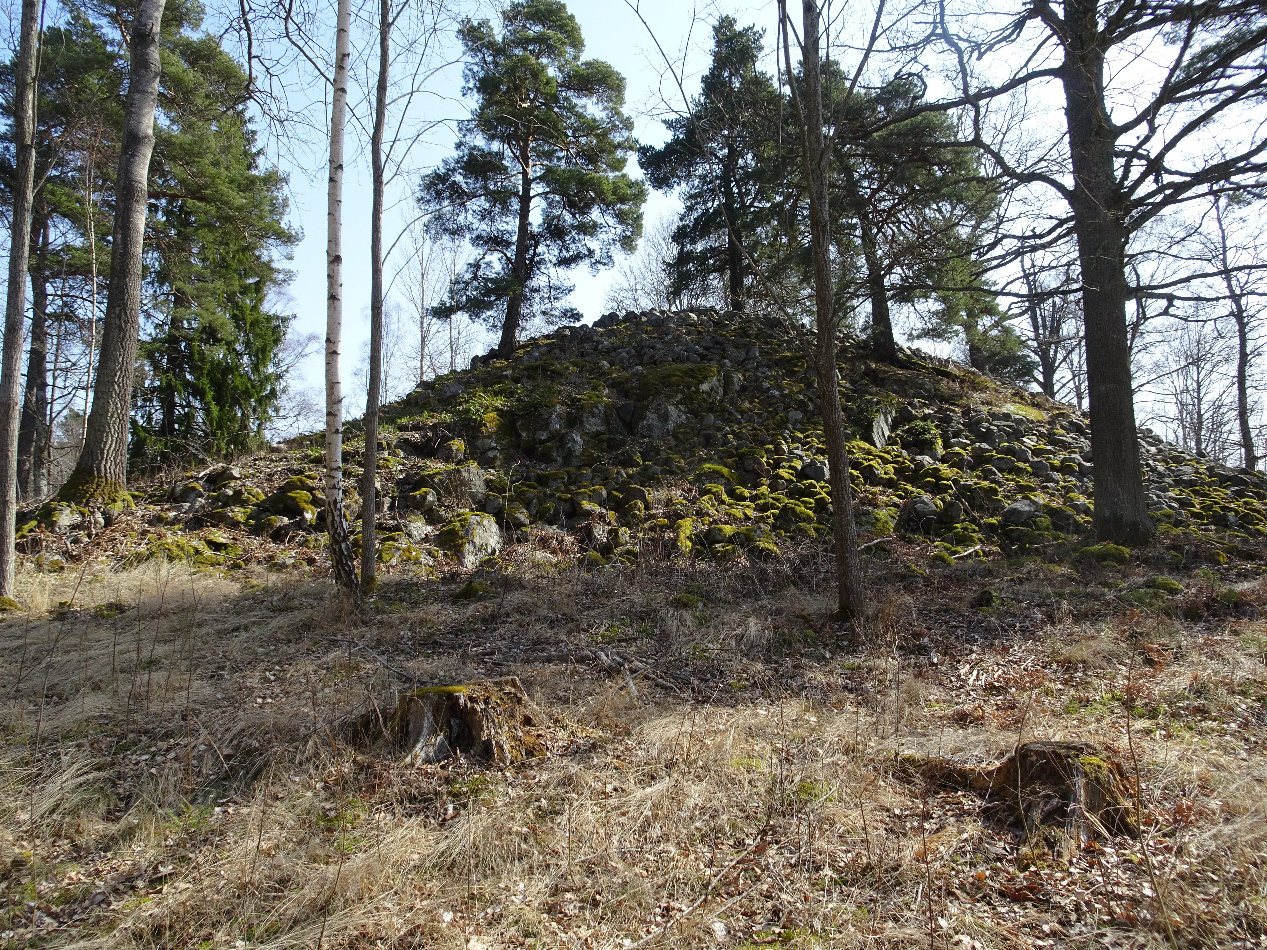 Hallundaröset